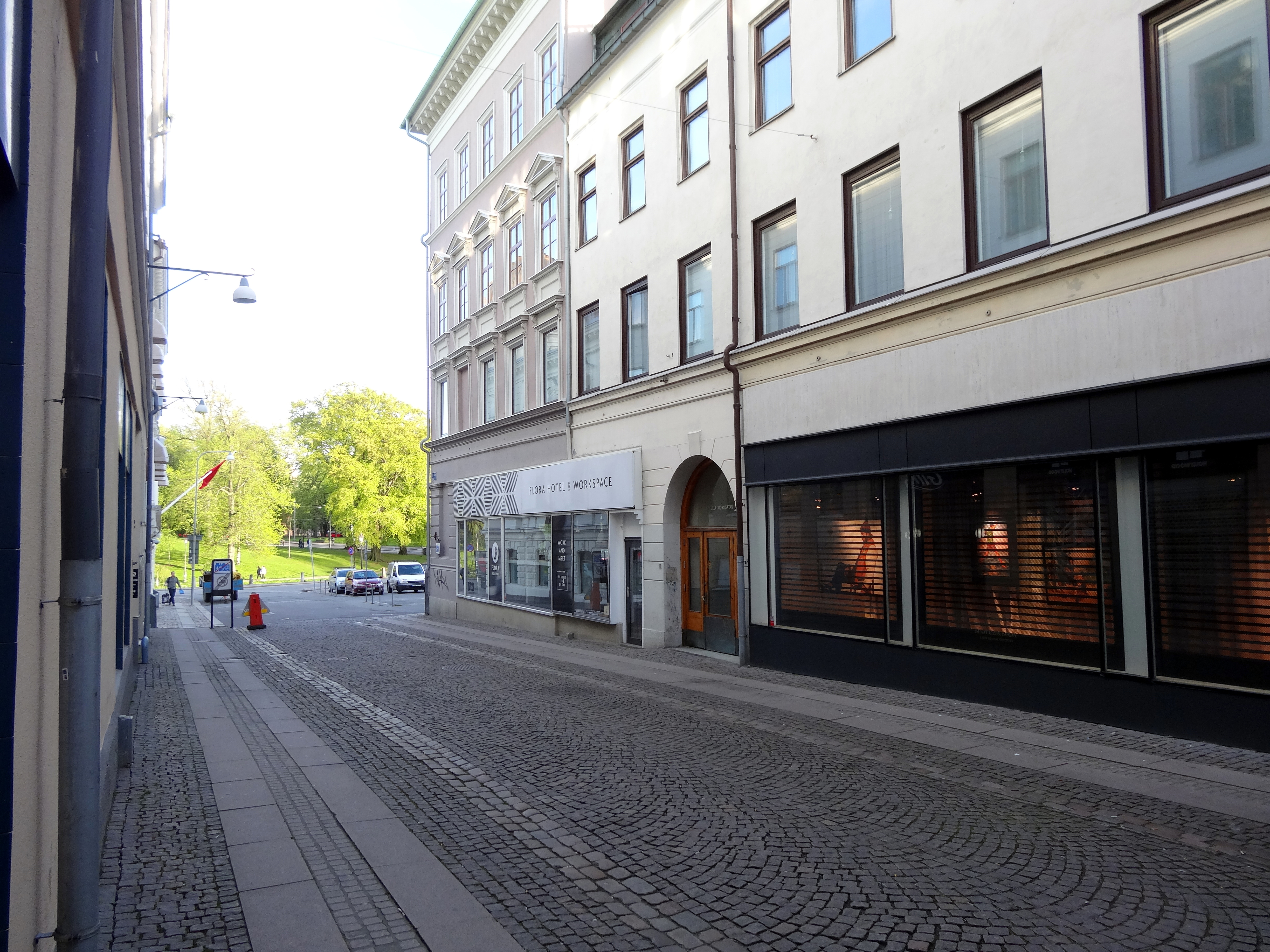 Lilla Korsgatan i stadsdelen Inom Vallgraven i centrala Göteborg. Vy mot söder.